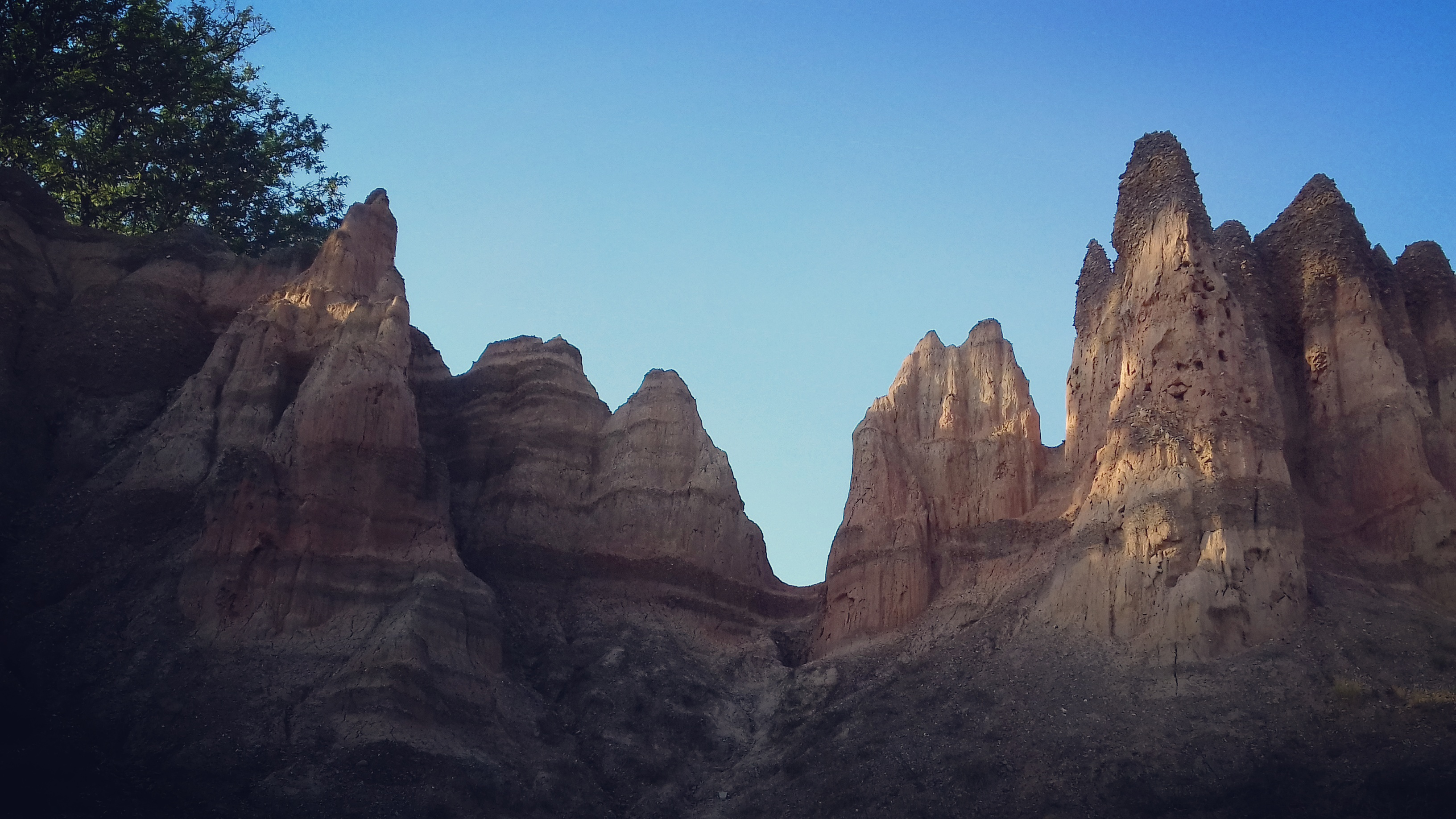 Srpski (latinica): Pješčane piramide u Foči